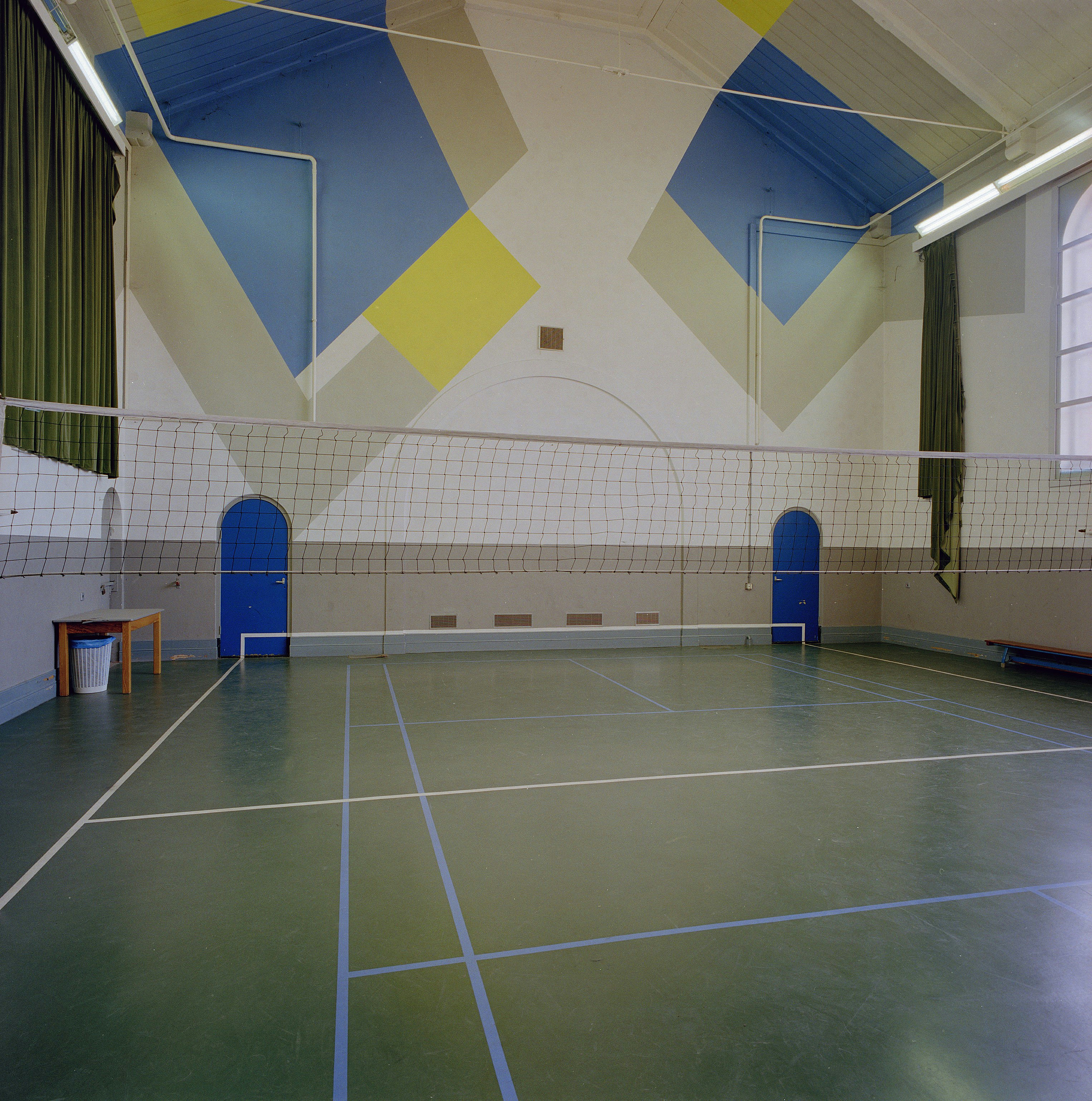 VOORMALIGE STRAFGEVANGENIS: INT. OVERZICHT, KERK GESCHIKT GEMAAKT VOOR SPORTACTIVITEITEN